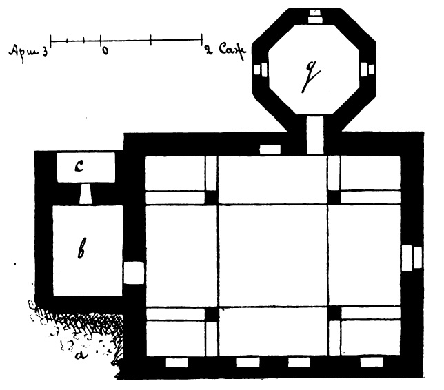 План старой мечети в Баку